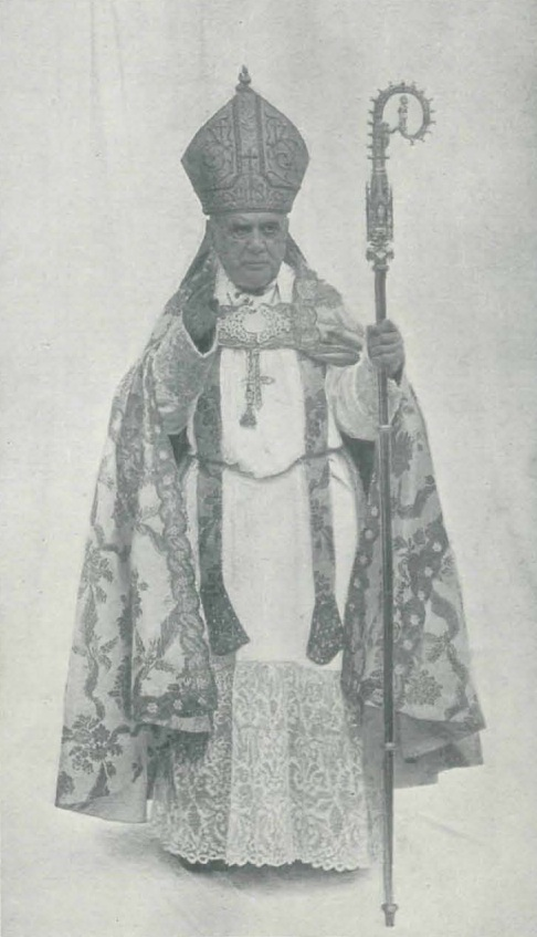 Fotografía de José Morgades y Gili realizada por Pablo Audouard